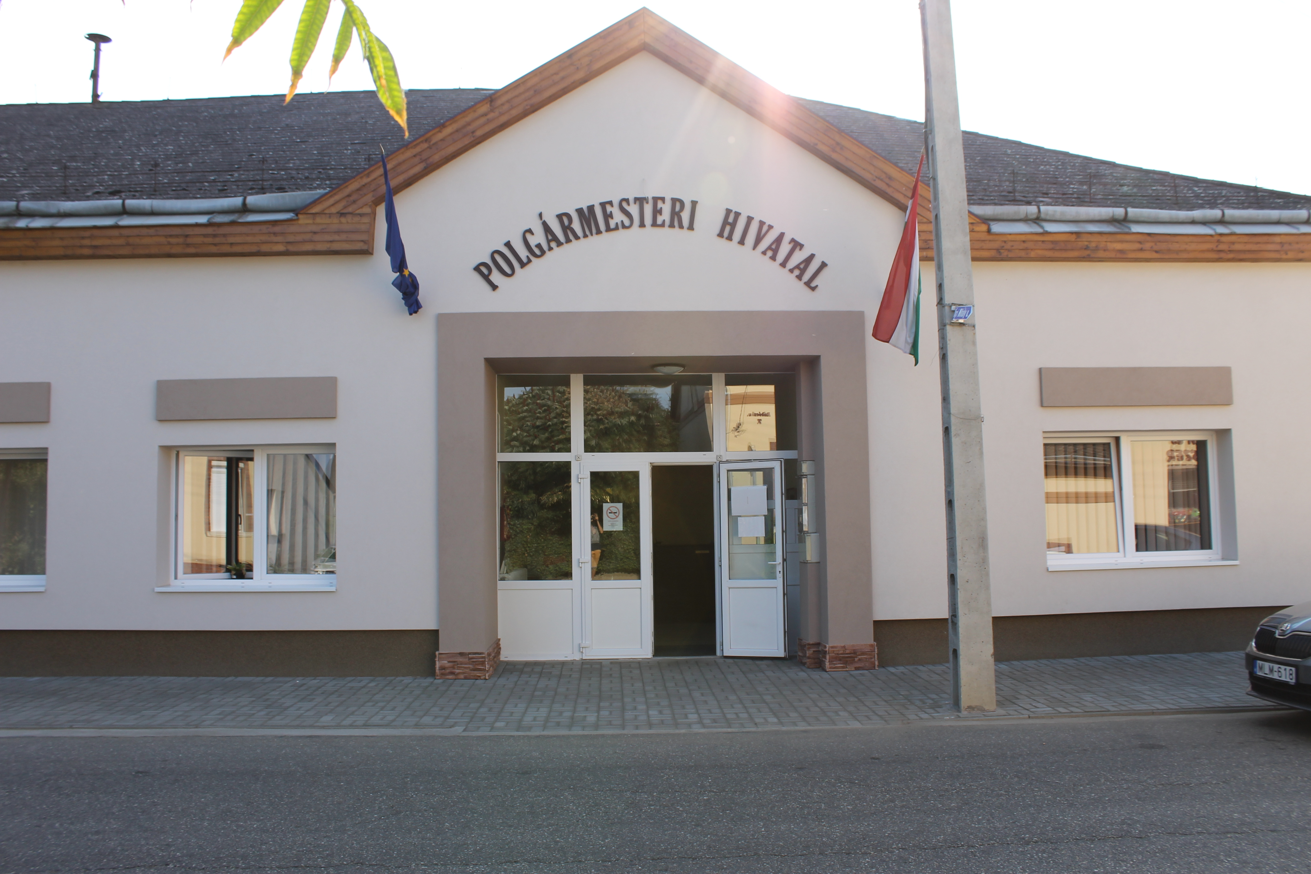 Balkány városháza